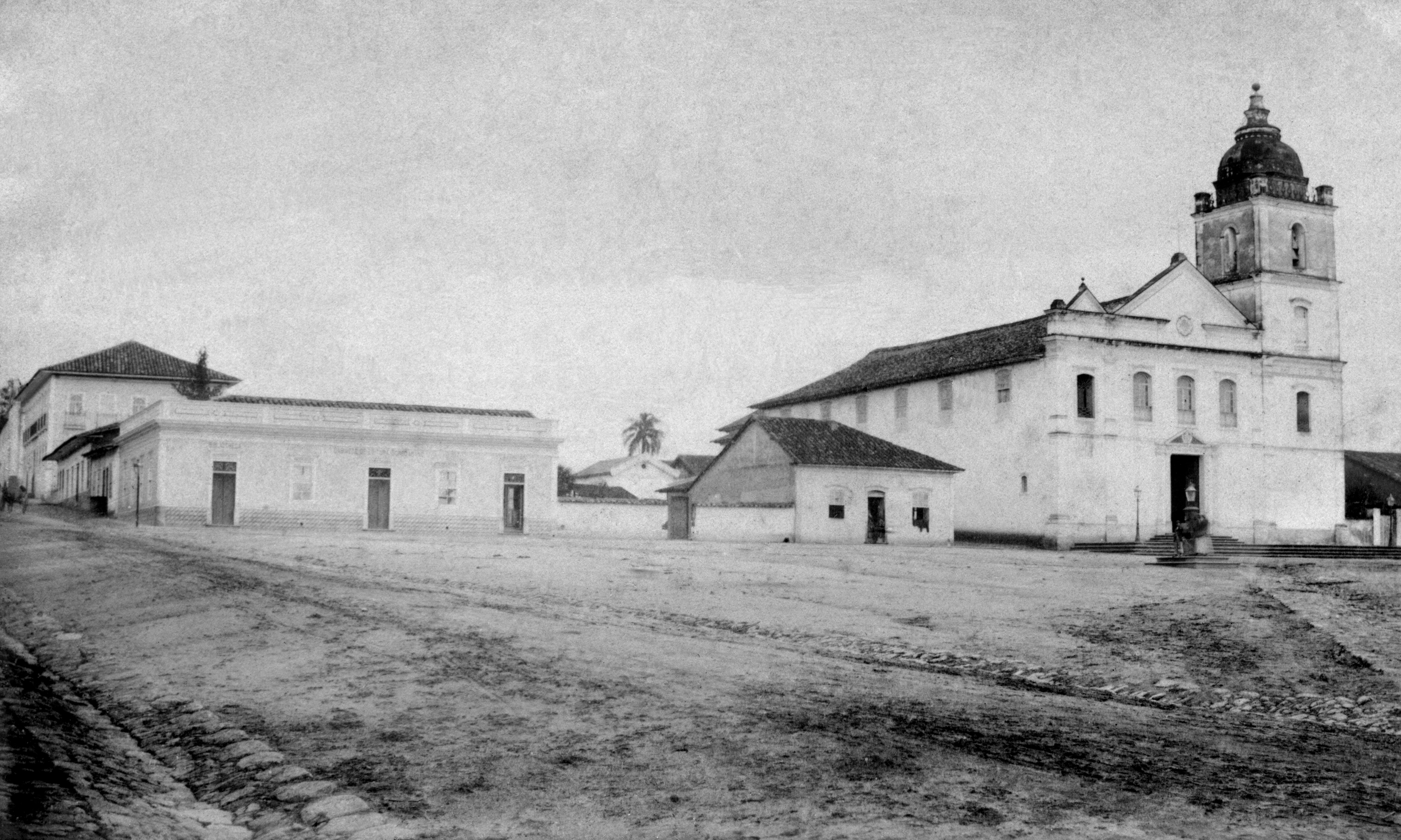 Album Fotografico - Vistas de Sorocaba 1875-1880